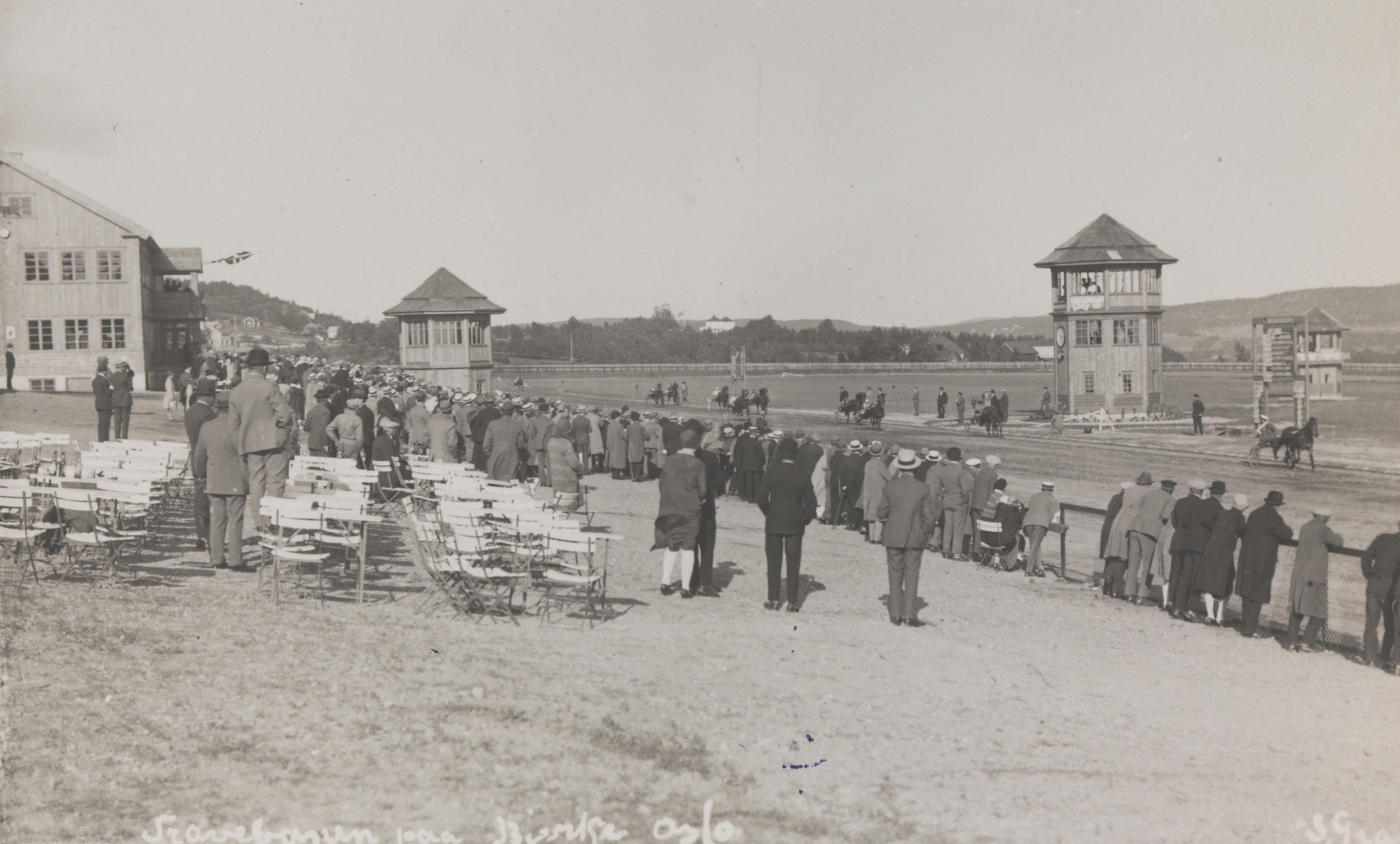 Bildet er hentet fra Nasjonalbibliotekets bildesamling Bjerkebanen, Oslo, Oslo